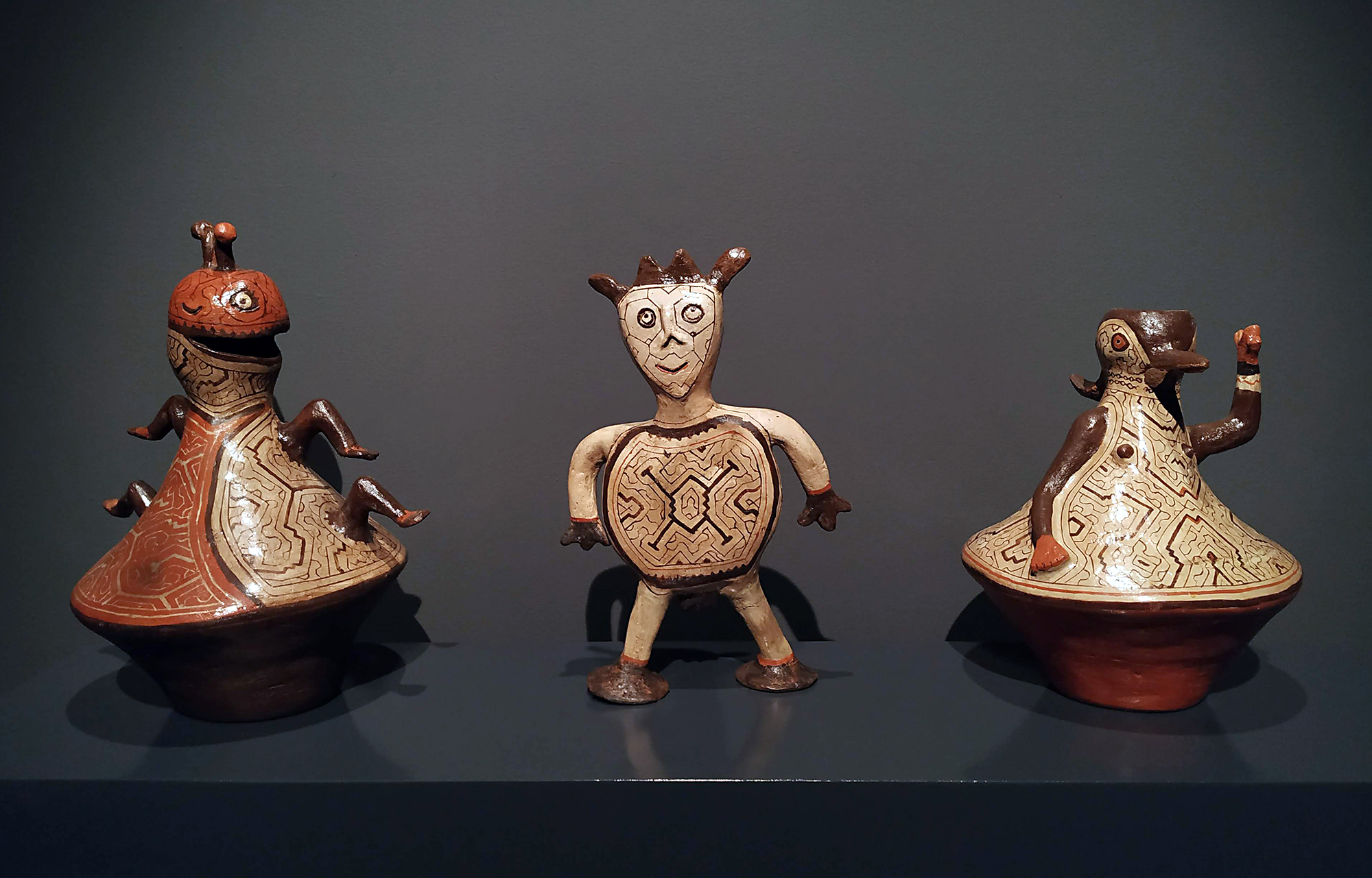 Duende del huayruro, "representa al llama suerte, adorna la casa y atrae suerte en todo lo que haces". Duende de la facha papa colorada, "es un fruto comestible con el que los antepasados hacían mandato para las fiestas grandes. Mujer pájaro picaflor "representa la imaginación de las plantas".